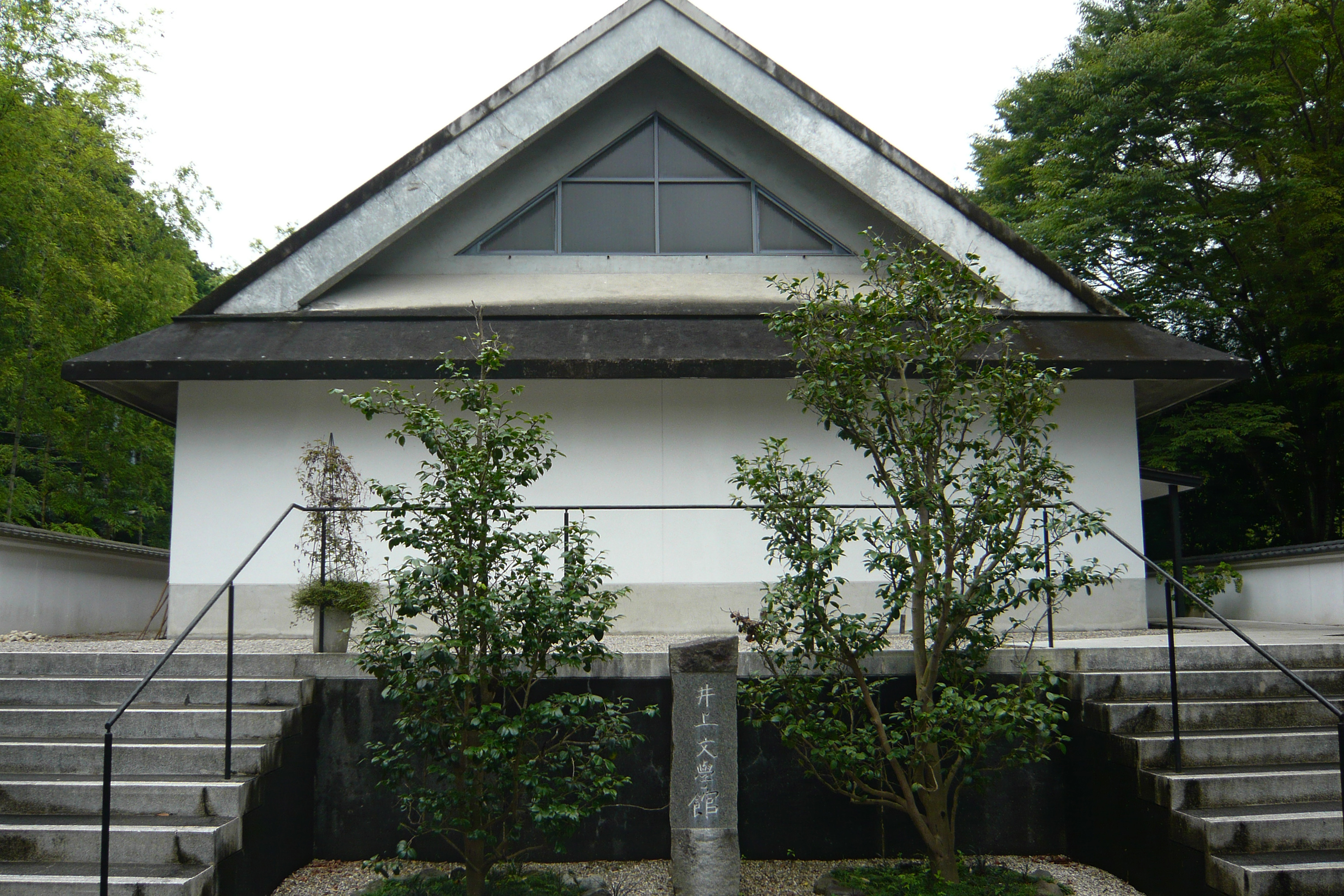 Inoue-Yasushi-bungakukan (井上靖文学館), Nagaizumi, Shizuoka prefecture, Japan